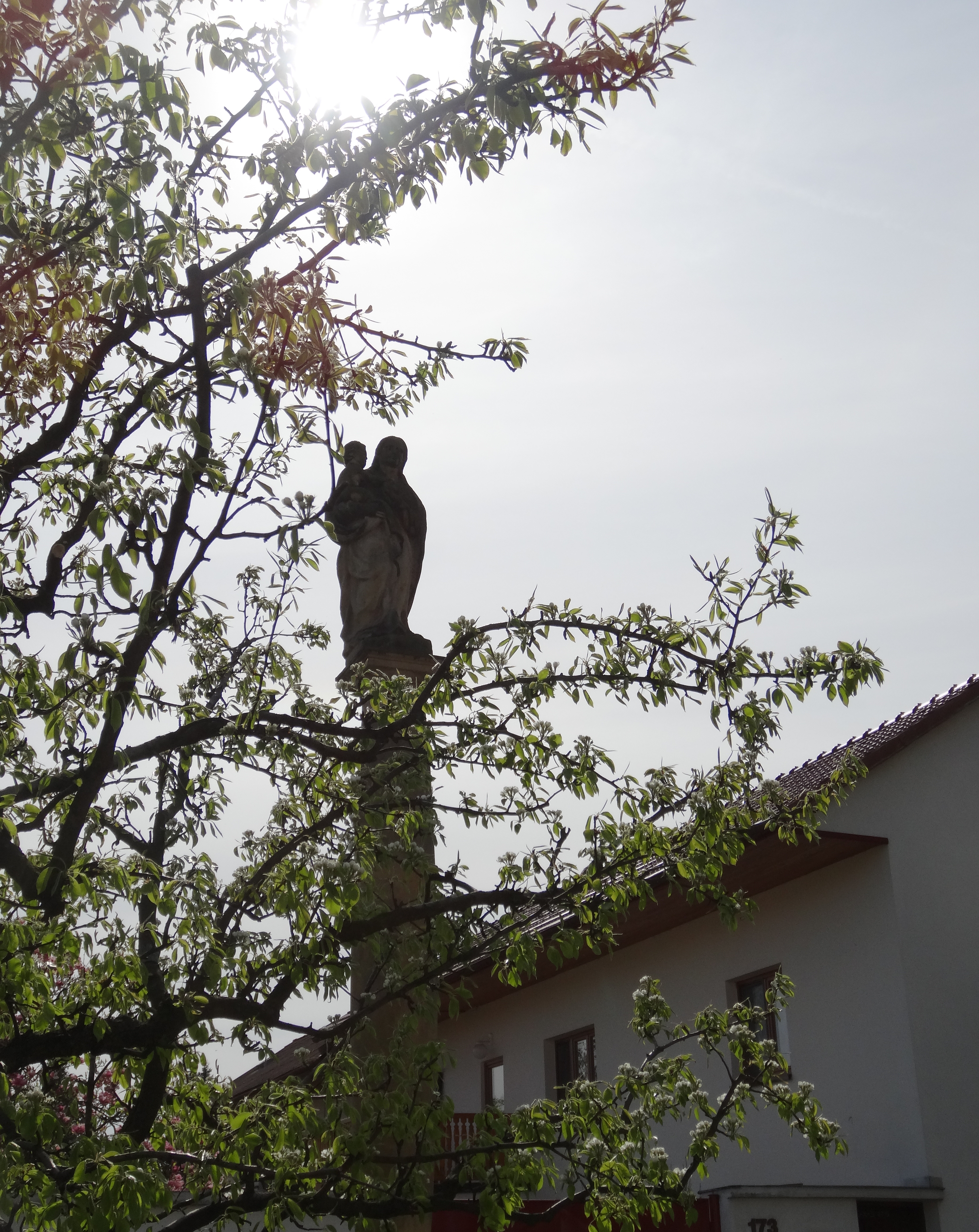 Jeden z sloupů na návsi